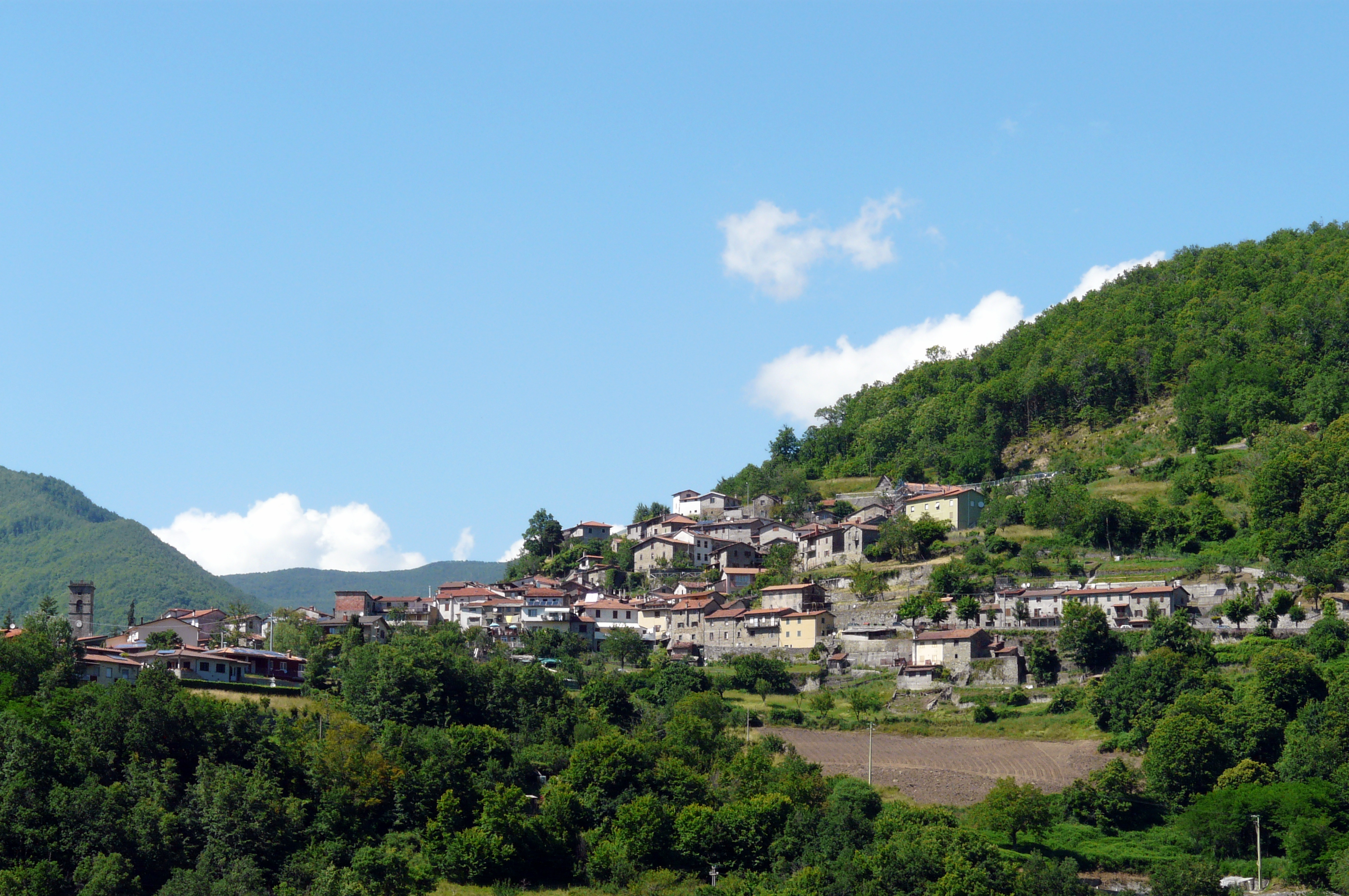 Panorama di Sillano, Toscana, Italia